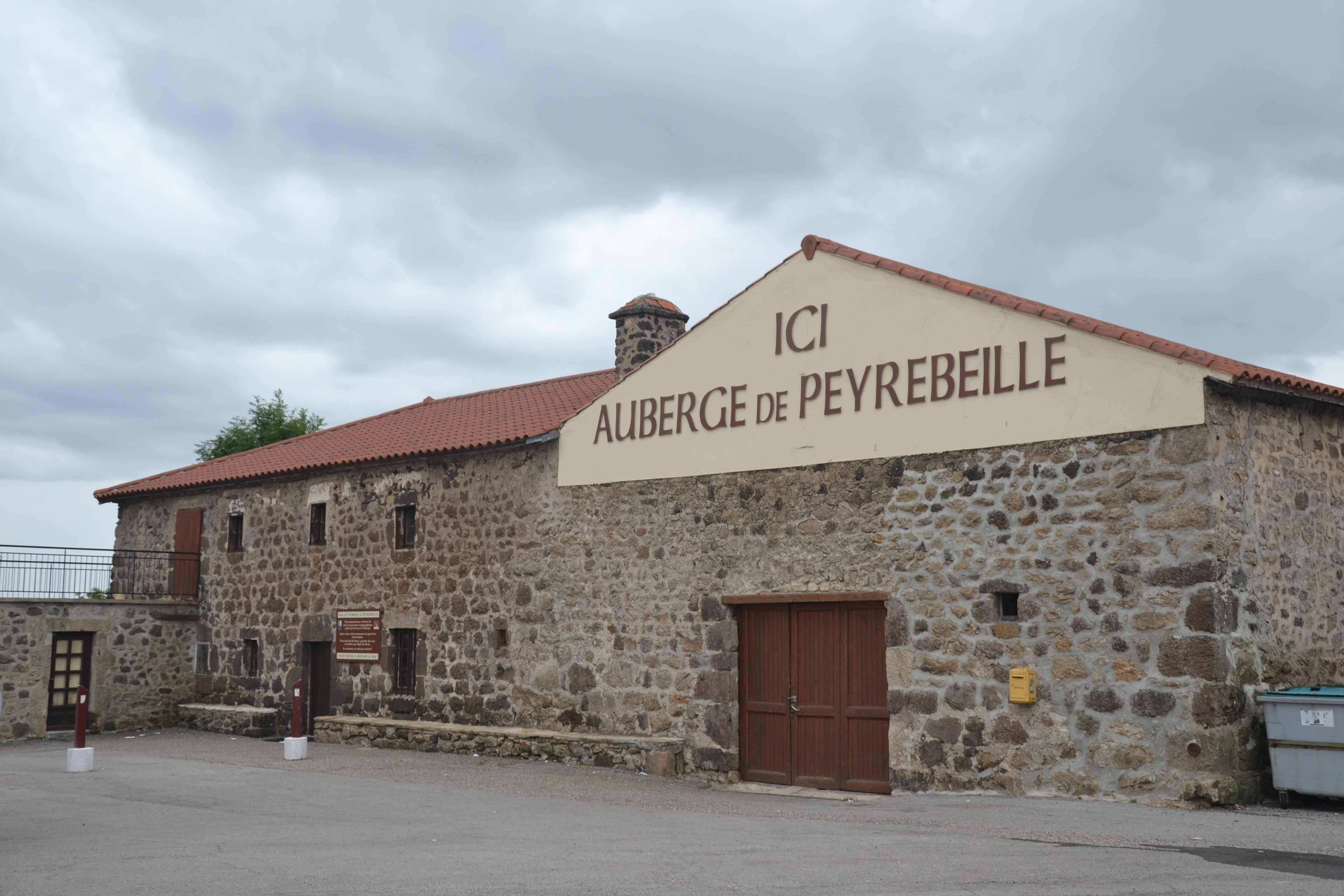 site de l'Auberge Rouge, sur la commune de Lanarce